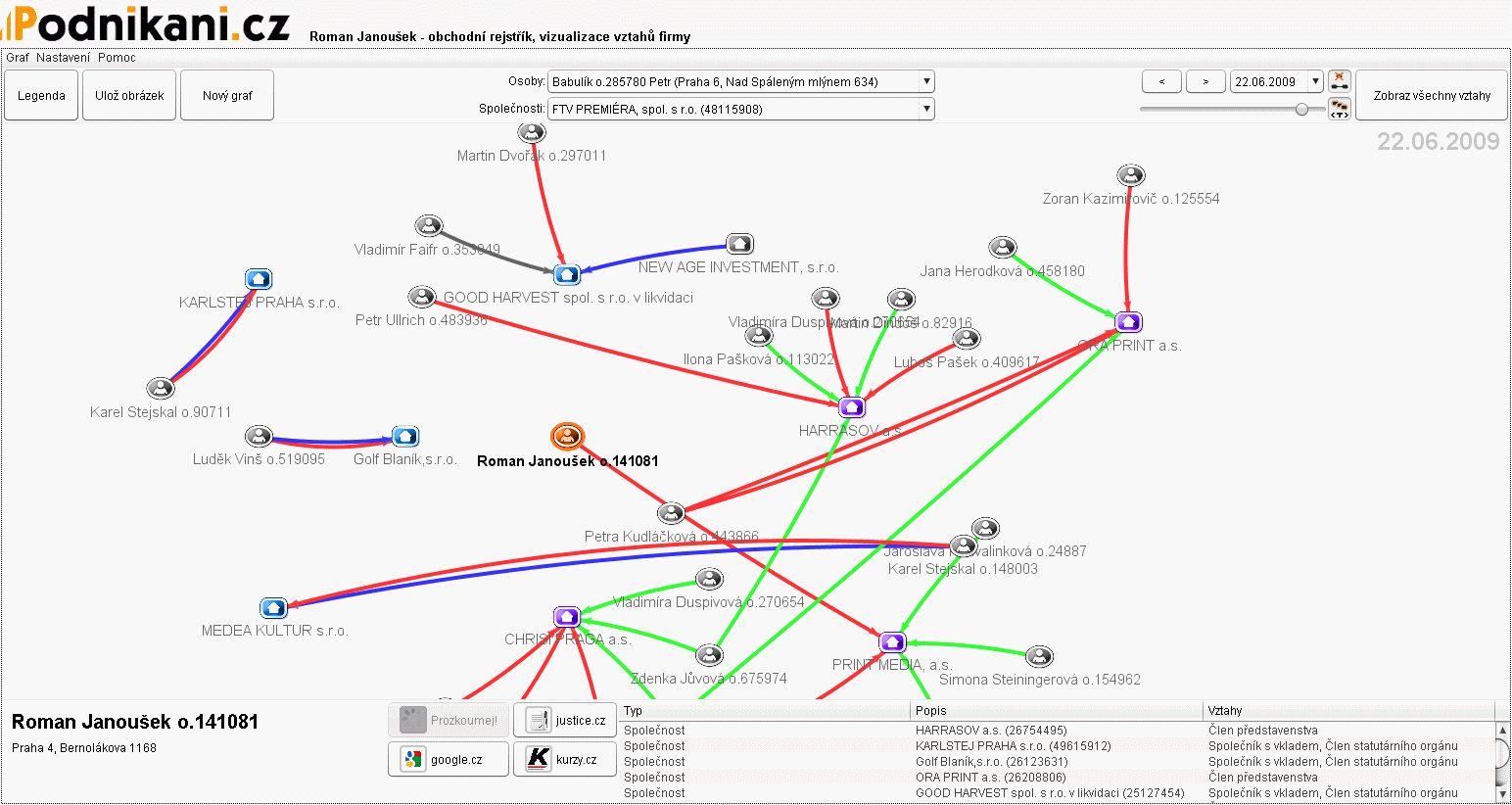 Roman Janoušek - grafické zobrazení vztahů firem v obchodním rejstříku